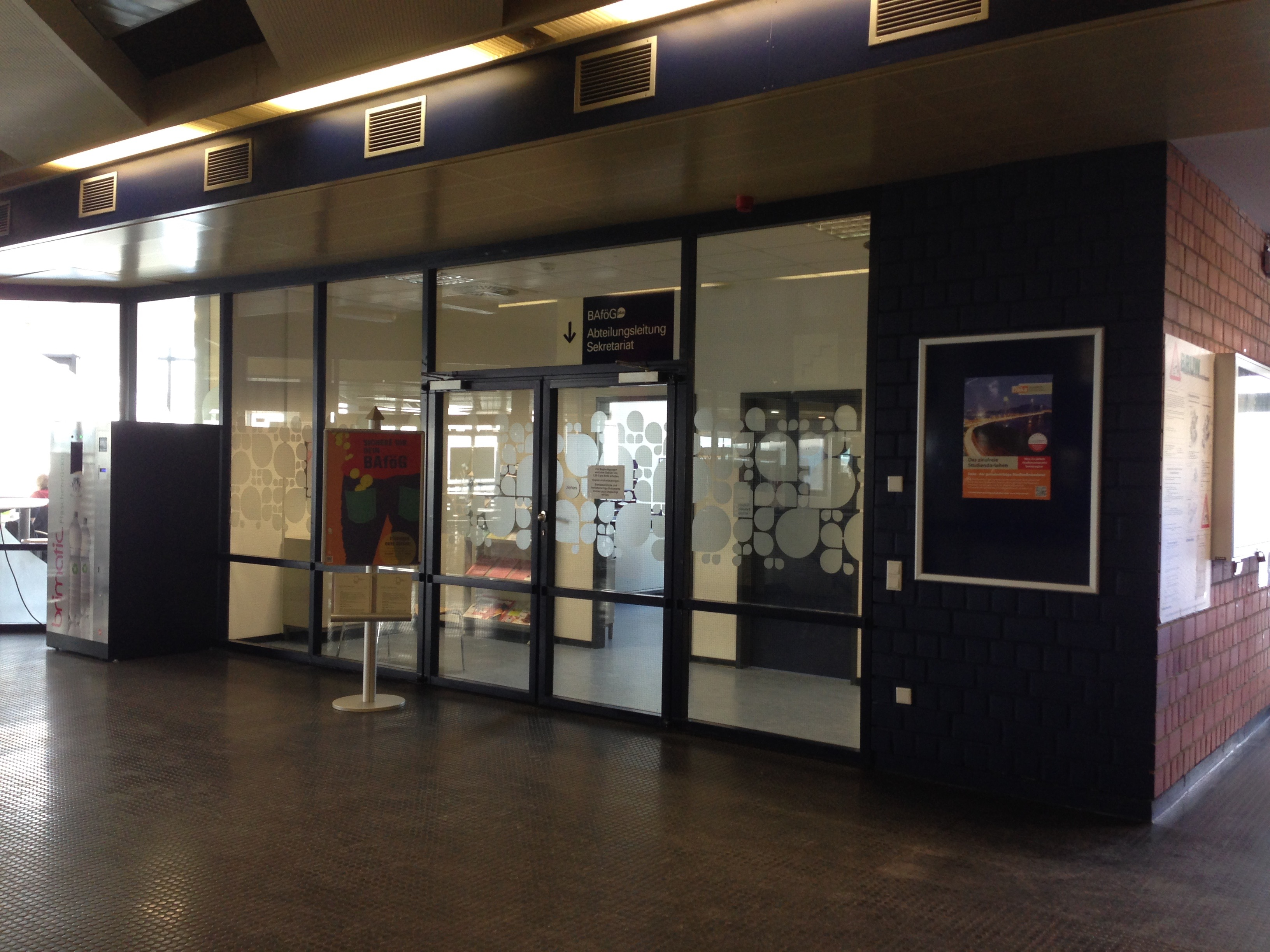 Büro der Bafög-Leitung im Mensatrakt auf ME03 an der Universität Wuppertal